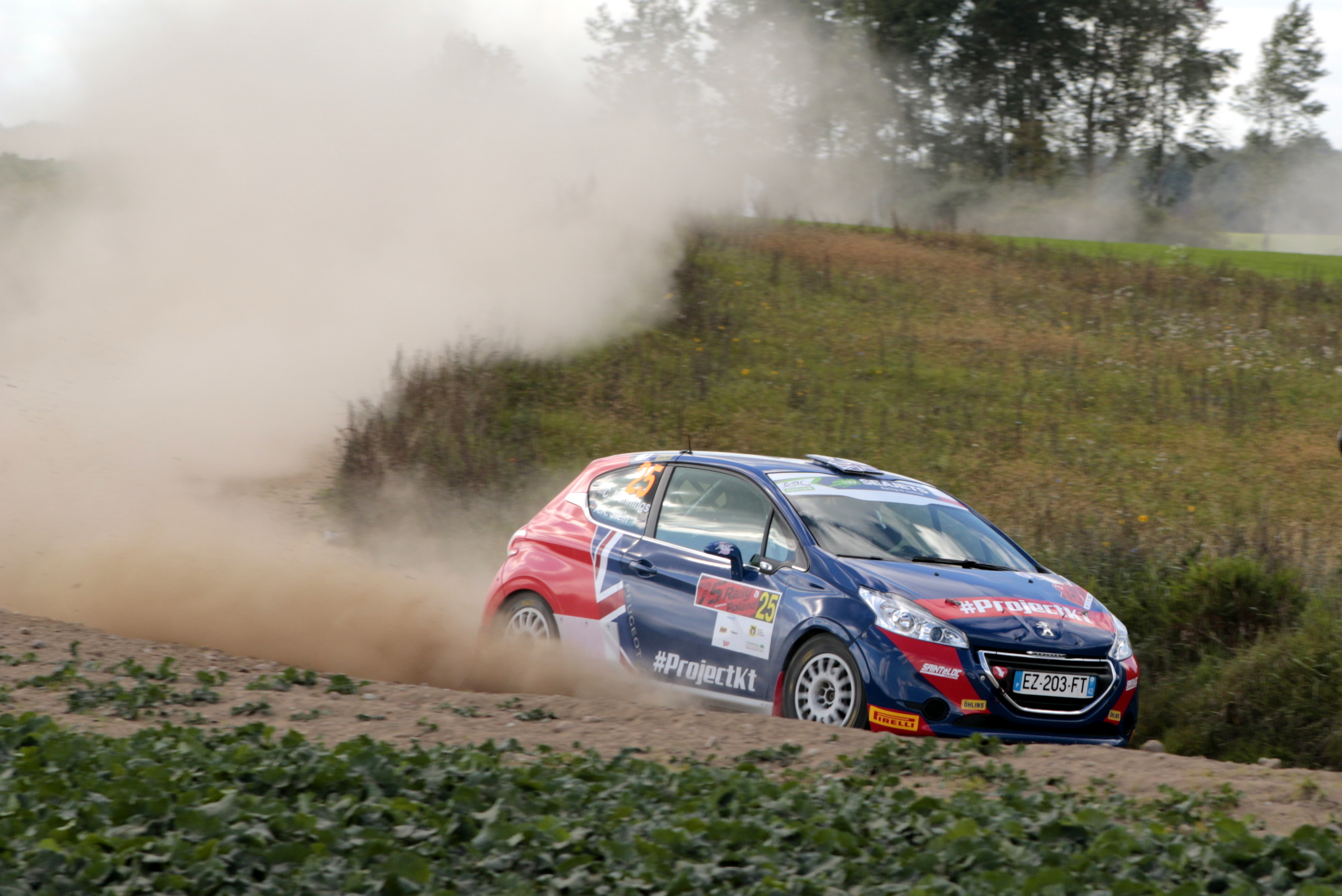 Rajd Polski - 2018 Catie Munnings